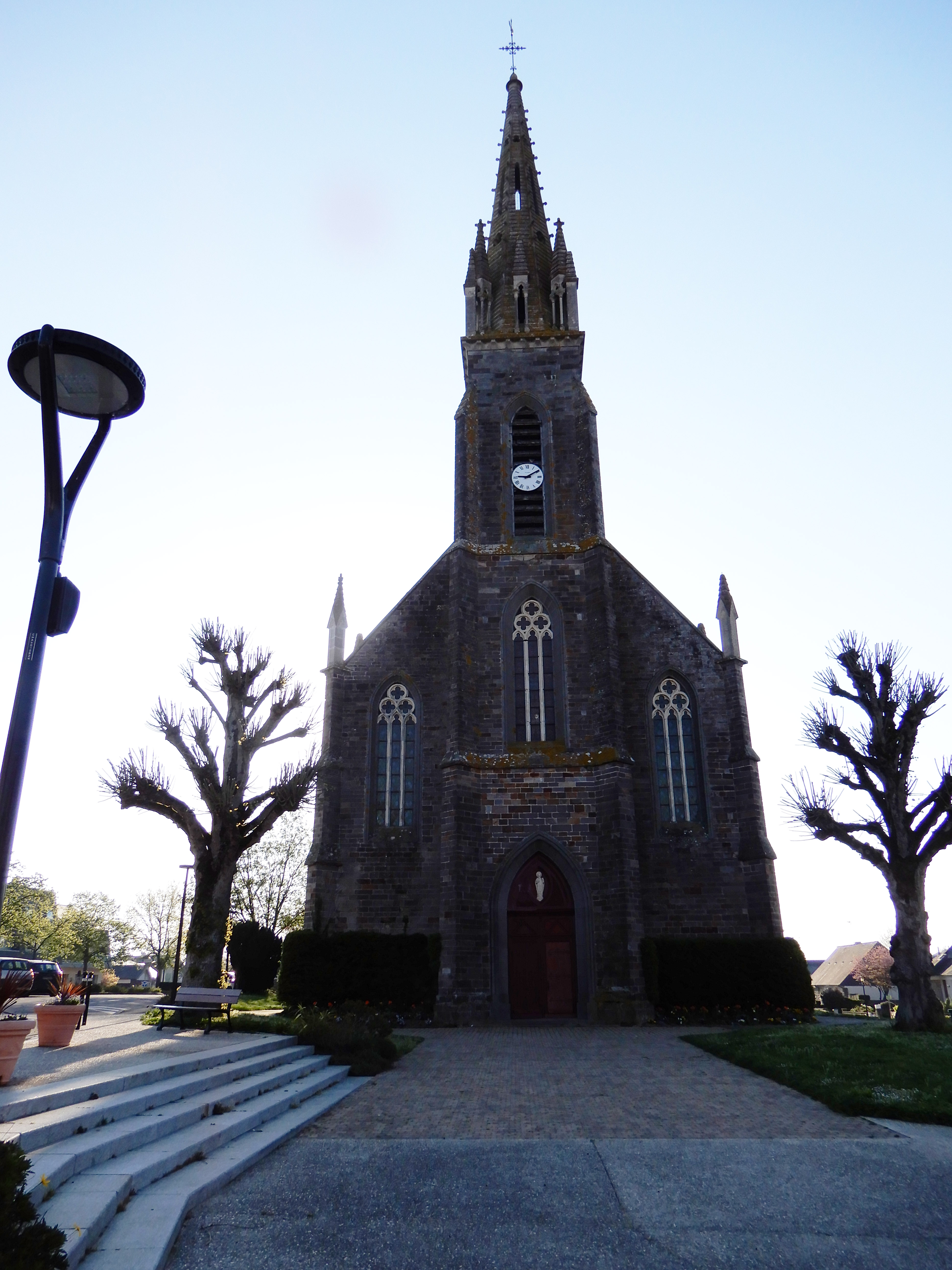 Chavagne - Eglise St Martin